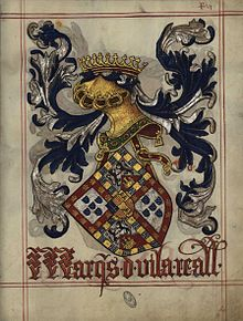 Armoiries des Comtes de Vila Real